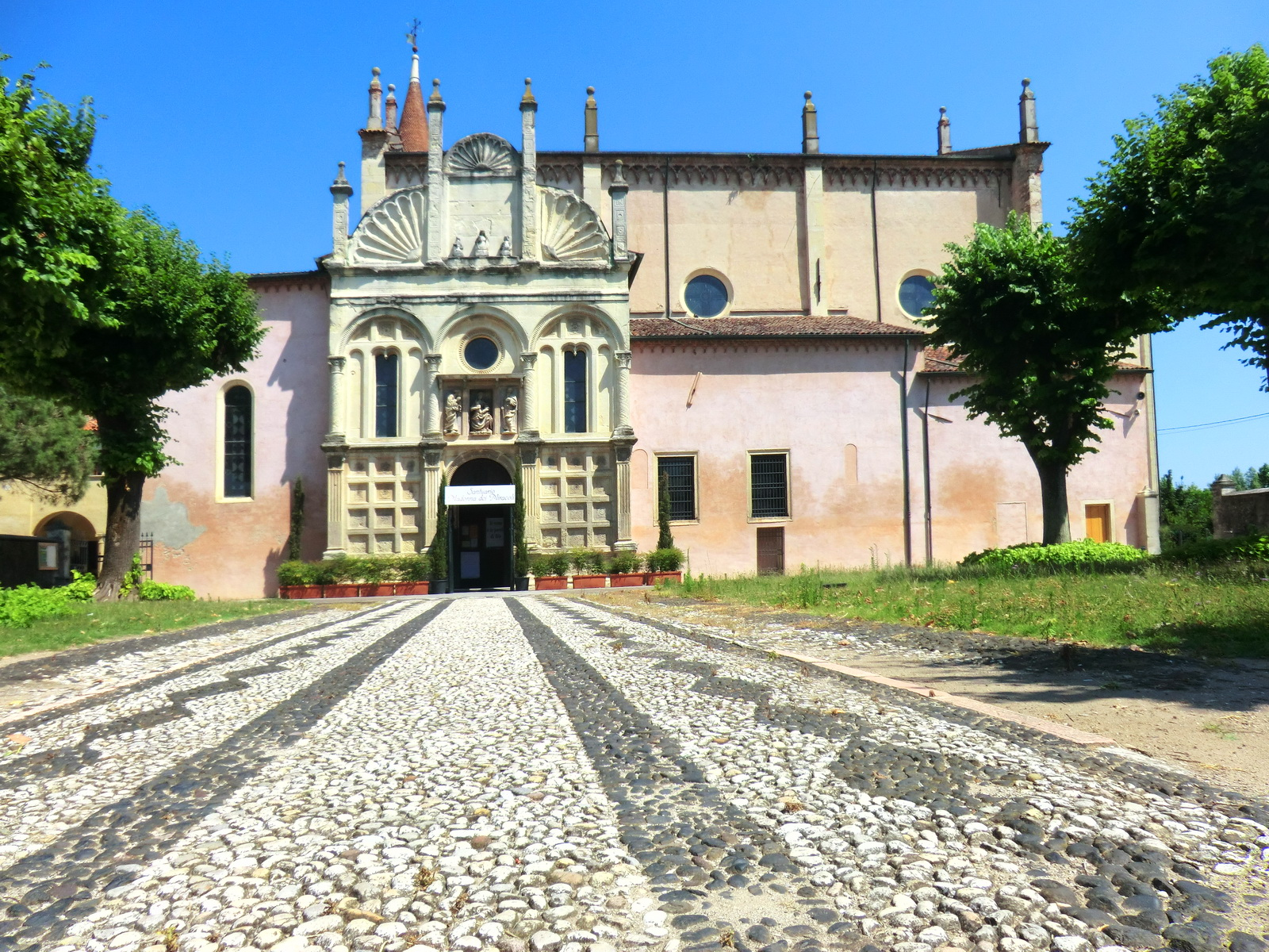 Santuario Madonna dei Miracoli, Lonigo Native nameSantuario Madonna dei Miracoli, LonigoLocationLonigo, Veneto, ItalyCoordinates45° 23′ 28.06″ N, 11° 21′ 53.69″ E